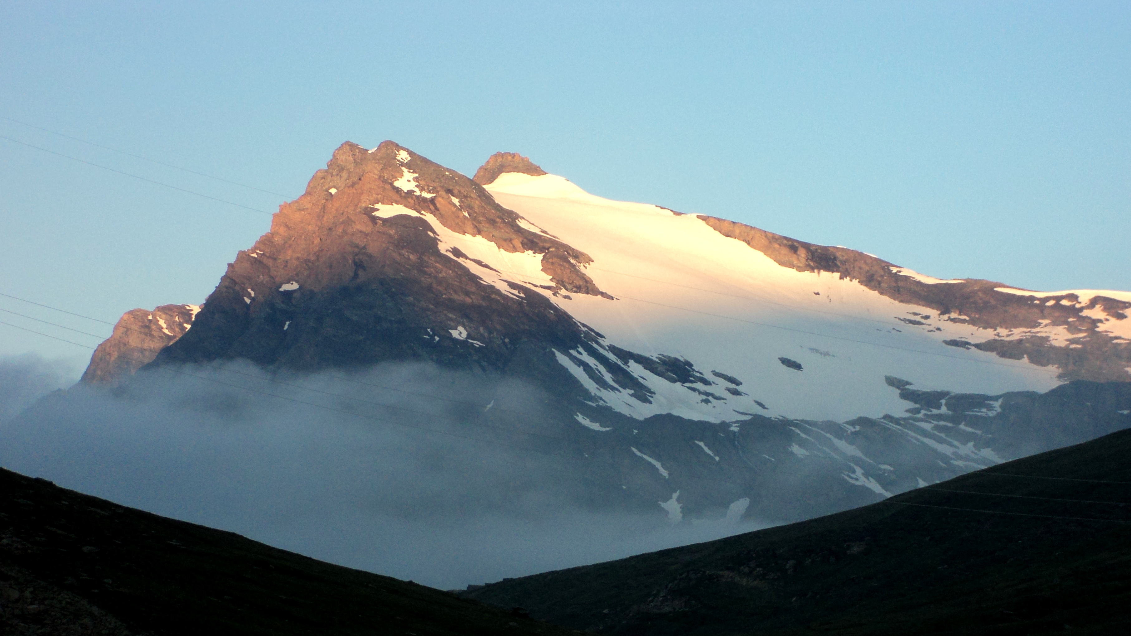 Gran Vaudala, Alpi Graie